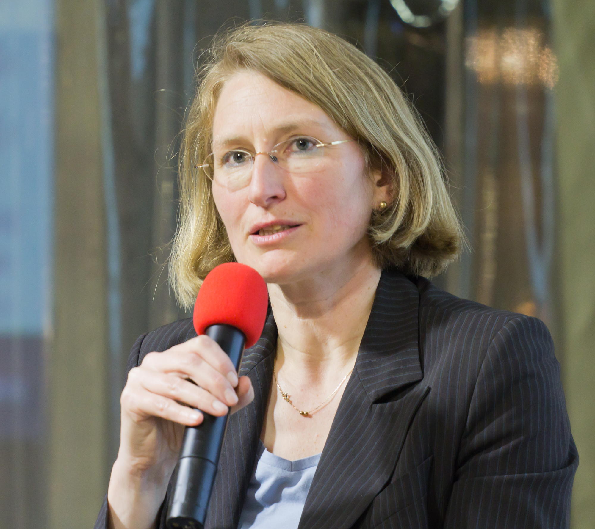 Andrea Pufke, Landeskonservatorin im Landschaftsverband Rheinland, Veranstaltung des Architektur Forum Rheinland, Thema „Kompliziert – Denkmalschutz und Denkmalpflege in NRW“